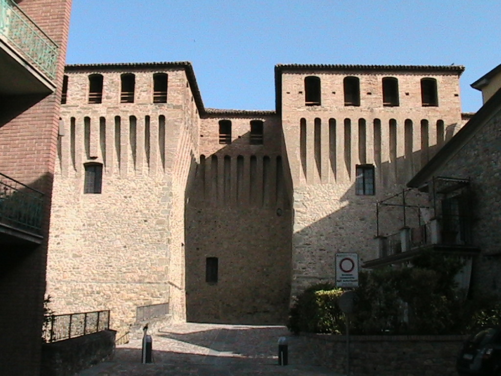 Varano de' Melegari - Castello Pallavicino